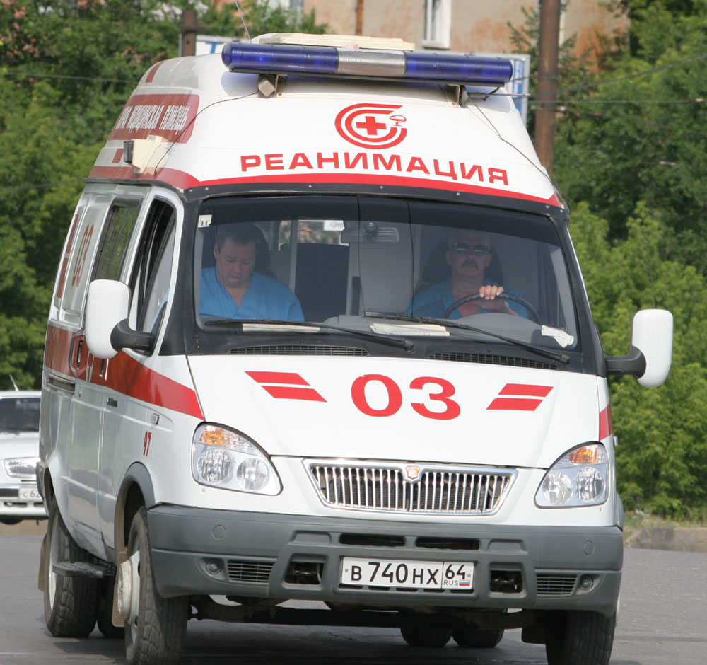 Реанемобиль на базе автомобиля Газель в Саратове